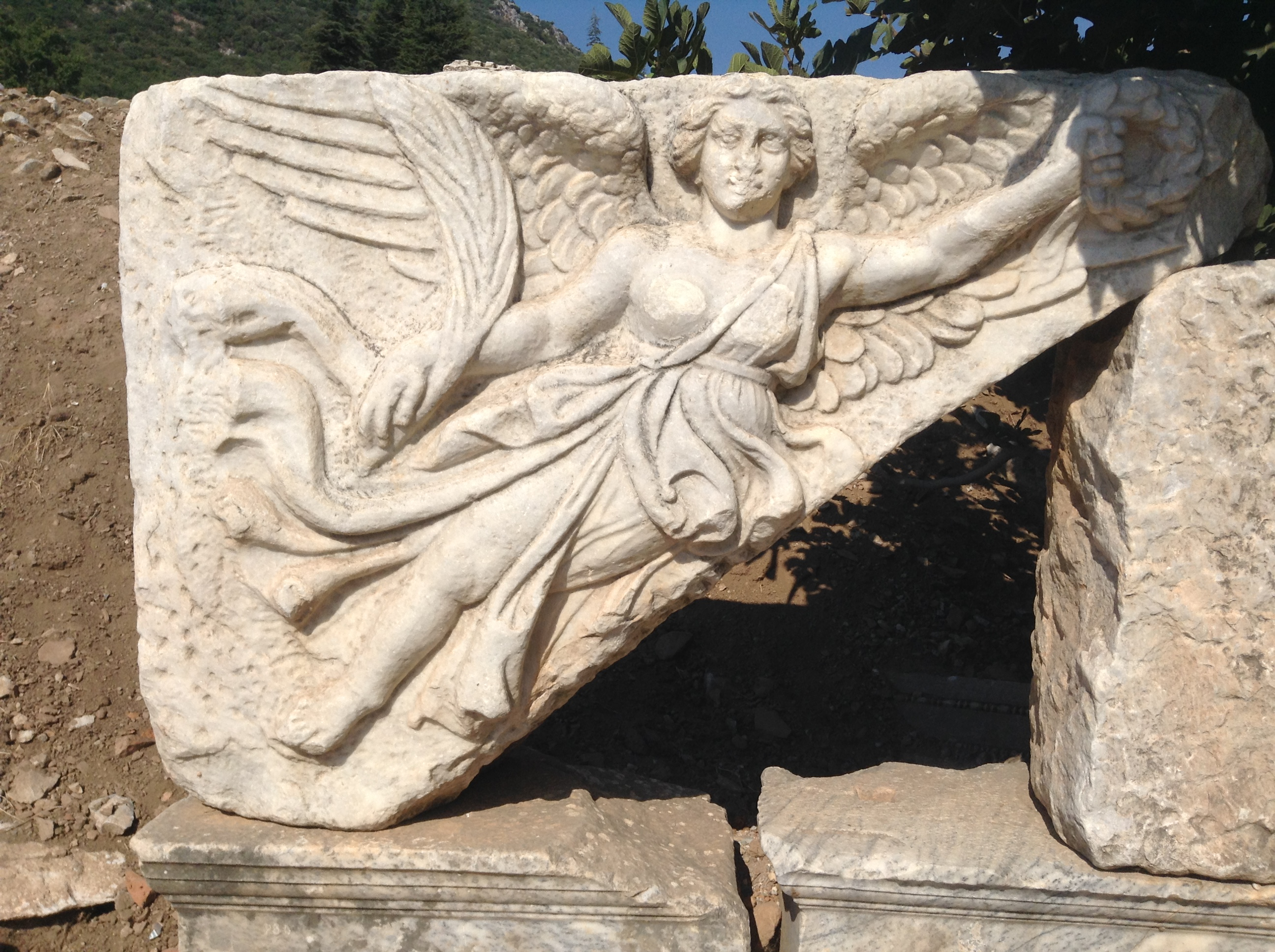 Przedstawienie bogini Nike. Ruiny antycznego miasta Efez.